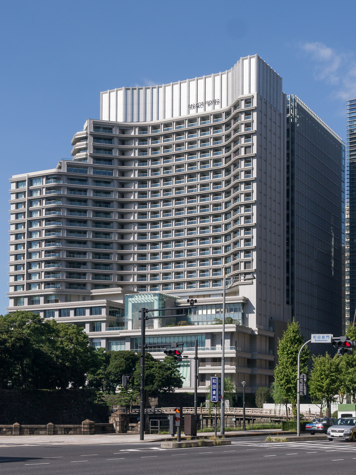 パレスホテル東京、東京都千代田区丸の内。